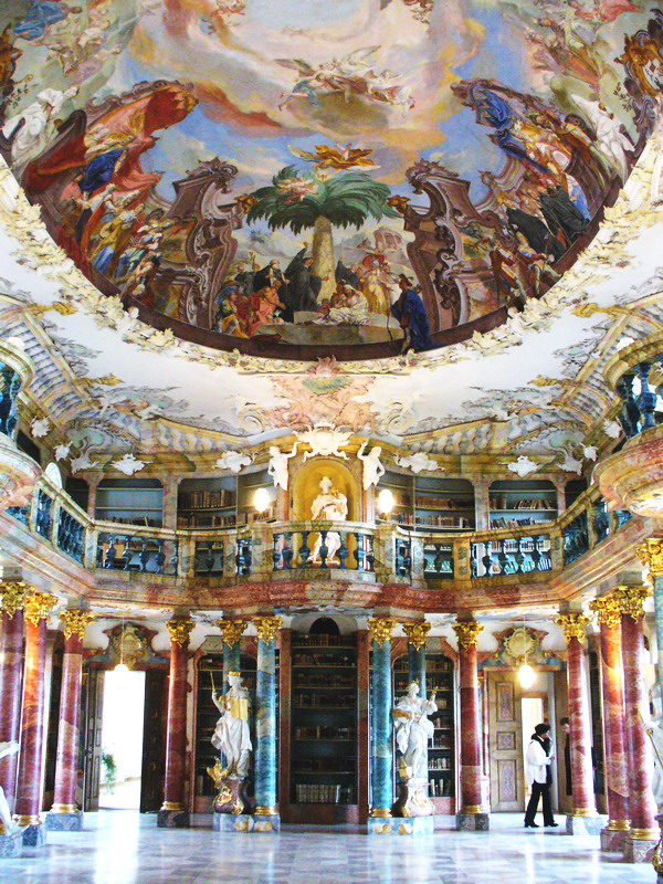 Bildbeschreibung: Ulm-Wiblingen Bibiliothekssaal Quelle: selbst fotografiert Fotograf : User:Enslin Datum: 9-april-2006 Sonstiges